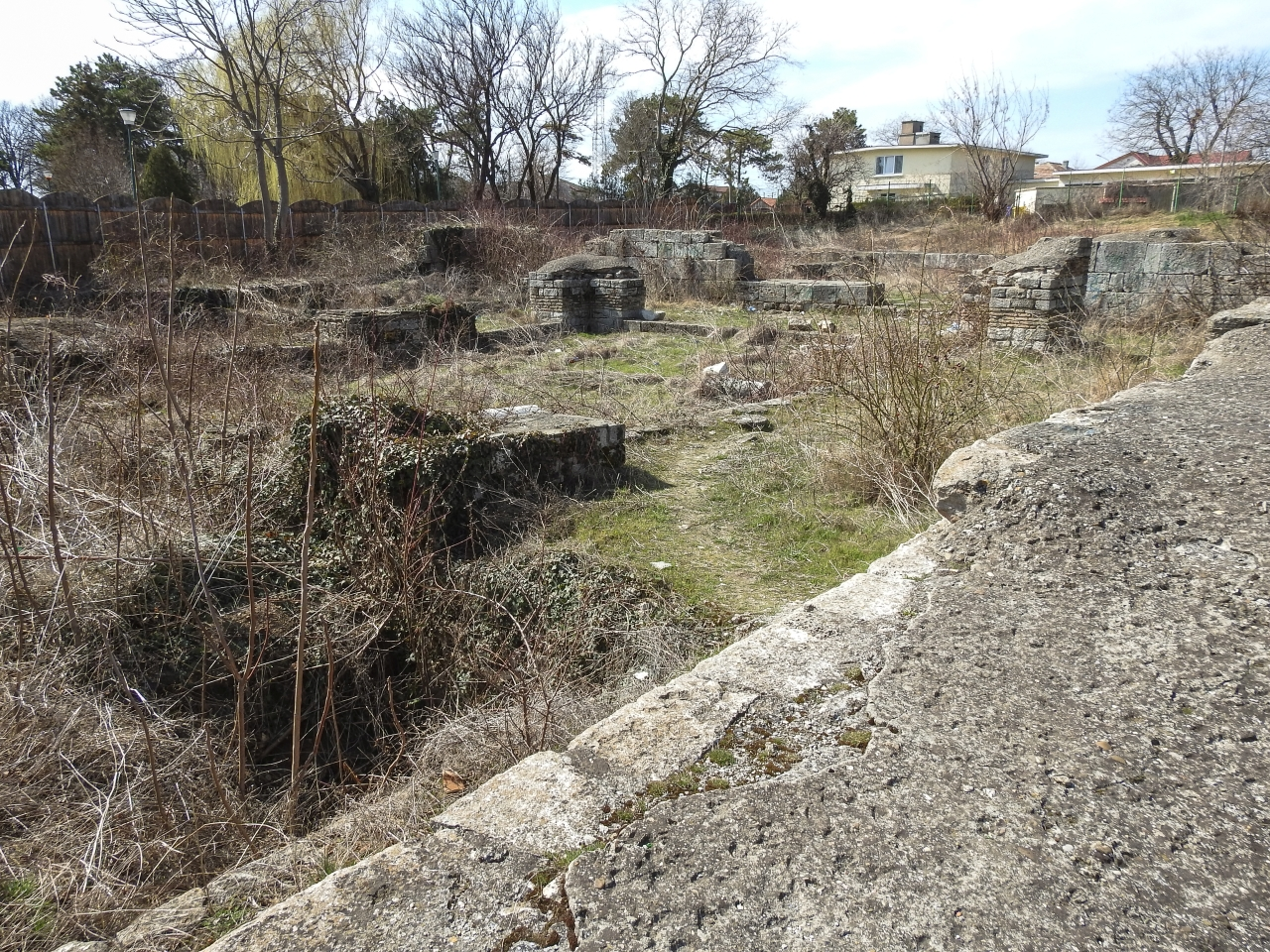 Bazilică 03